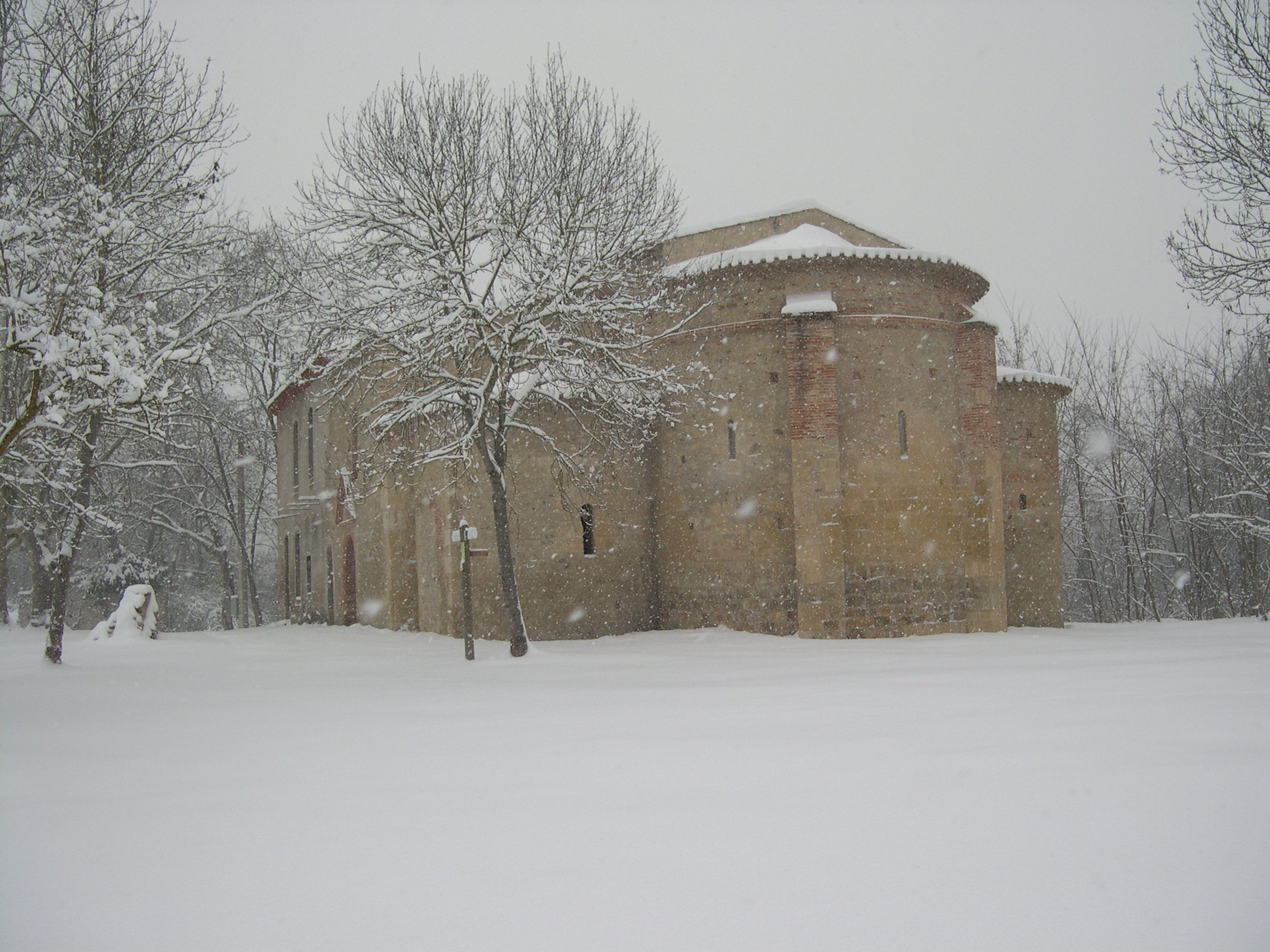 Cliché de l'Abbaye de Cailloup lors d'un des importants épisode neigeux de janvier 2010